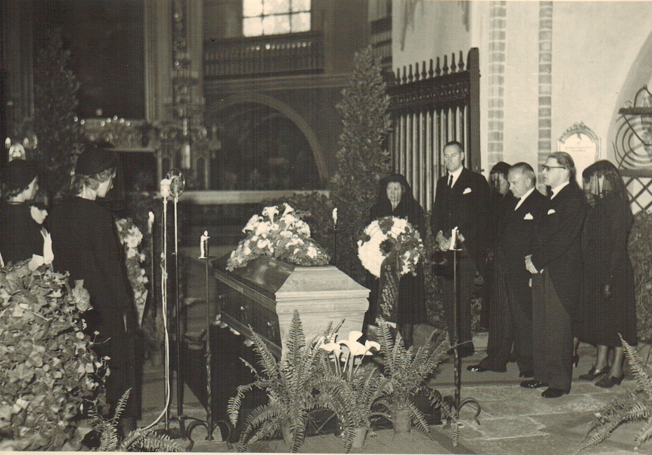 Aline Grönberg siunaus